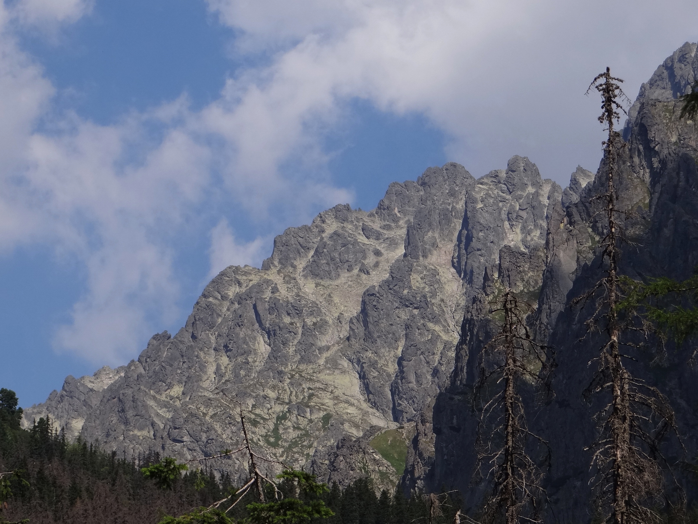 Pyšný hrebeň. Durna Grań, widok z Doliny zimnej Wody